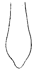 fungi stem